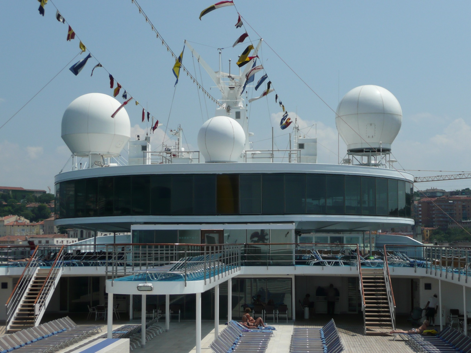 Le pont Cortina du Costa Classica